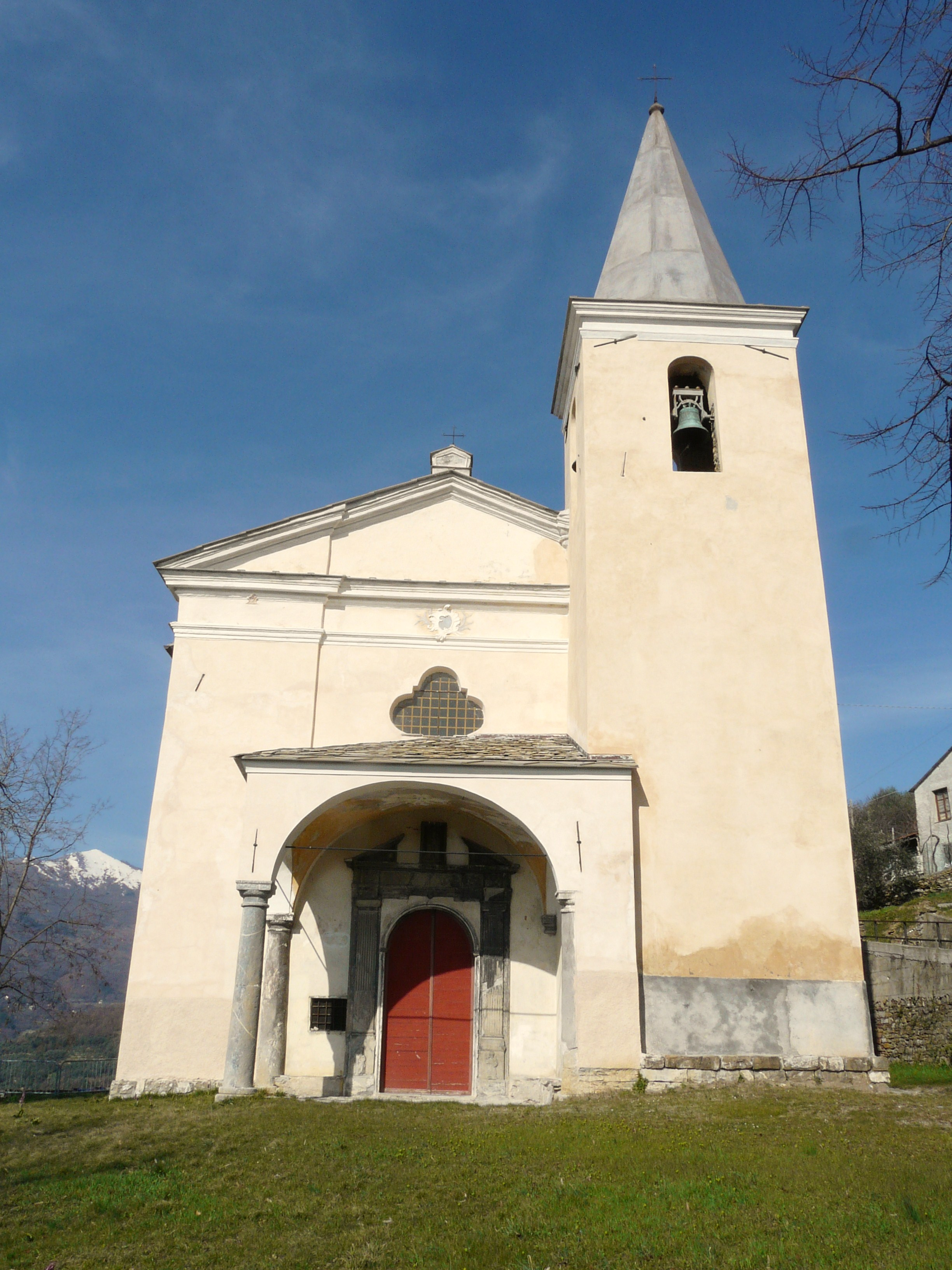 Santuario di San Paolo, Aurigo, Liguria, Italia